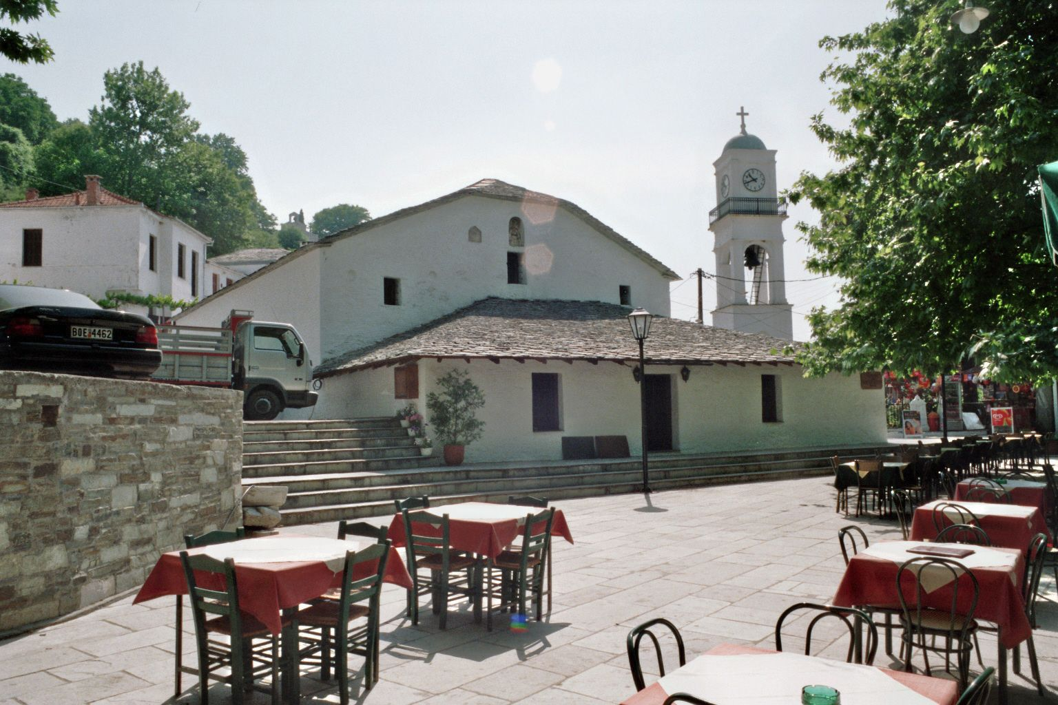 Ο Ι.Ν. των Αγίων Ταξιαρχών στις Μηλιές Μαγνησίας. Φώτο: Χρήστης:Flashdart2, 2006